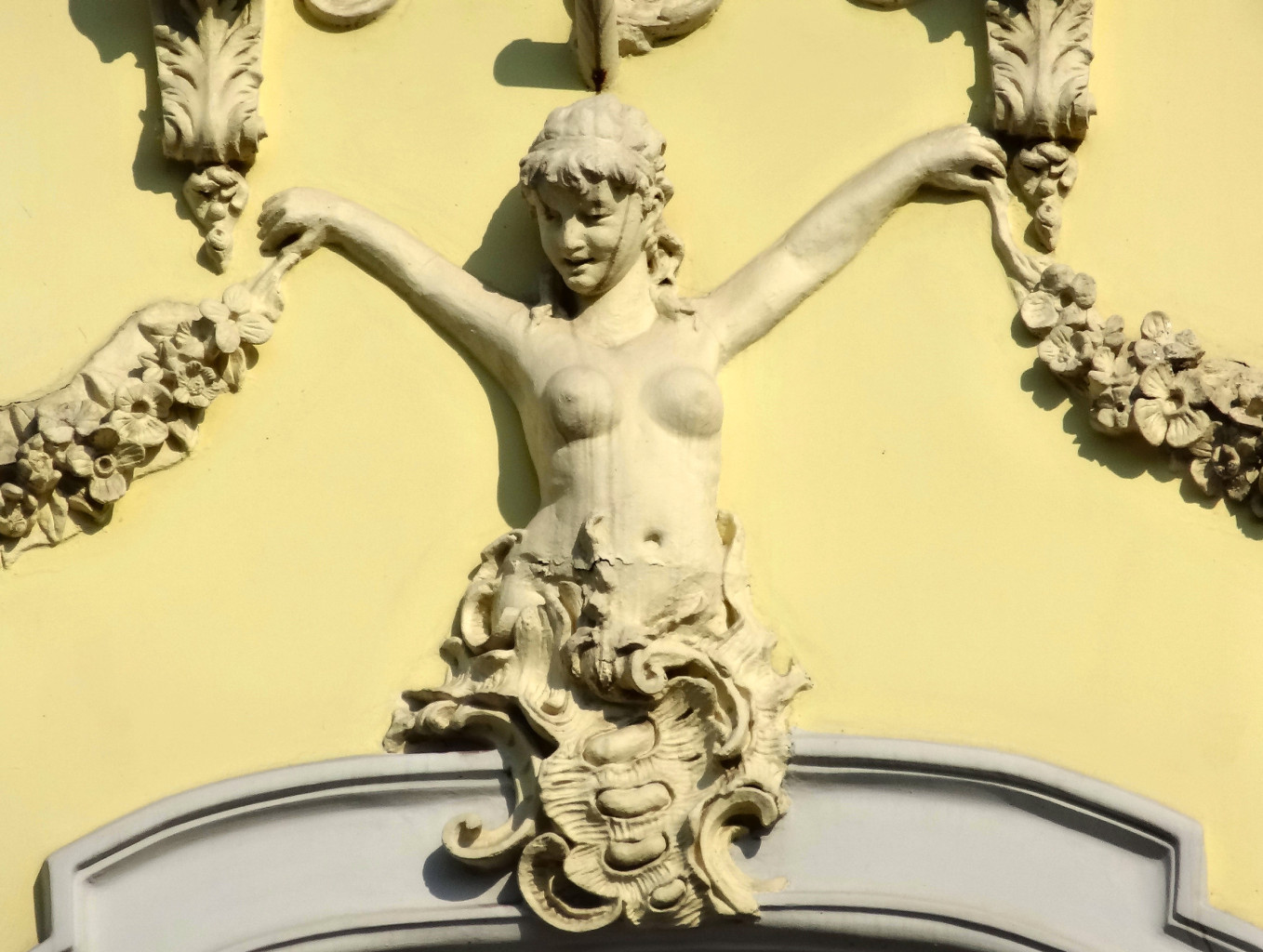 Kamienica przy ul. Gdańskiej 119 w Bydgoszczy, zbud. w 1896 r. wg proj. Fritza Weidnera